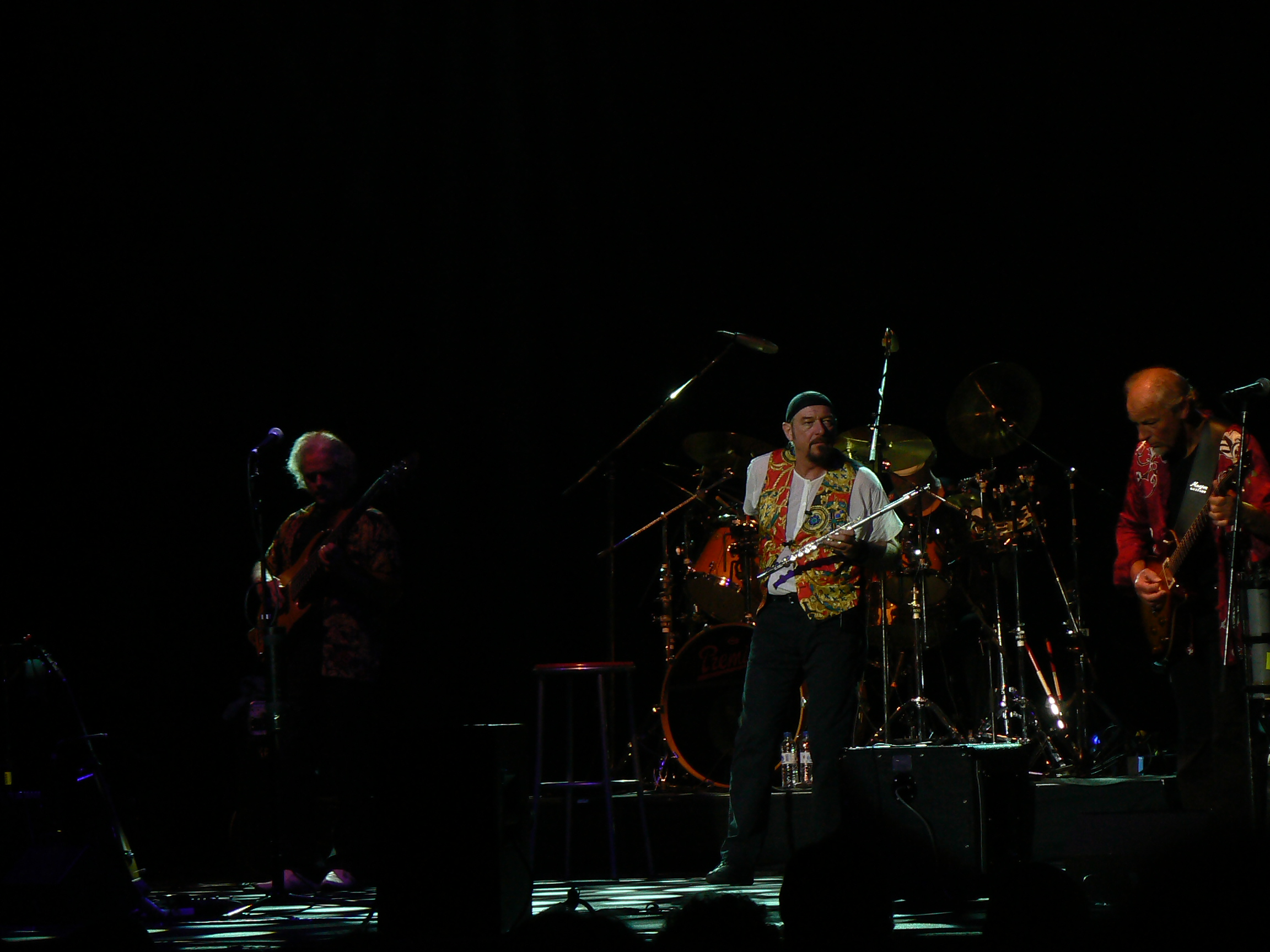 Jethro Tull en concert à Forest National (Bruxelles) en Belgique le 01 juin 2007